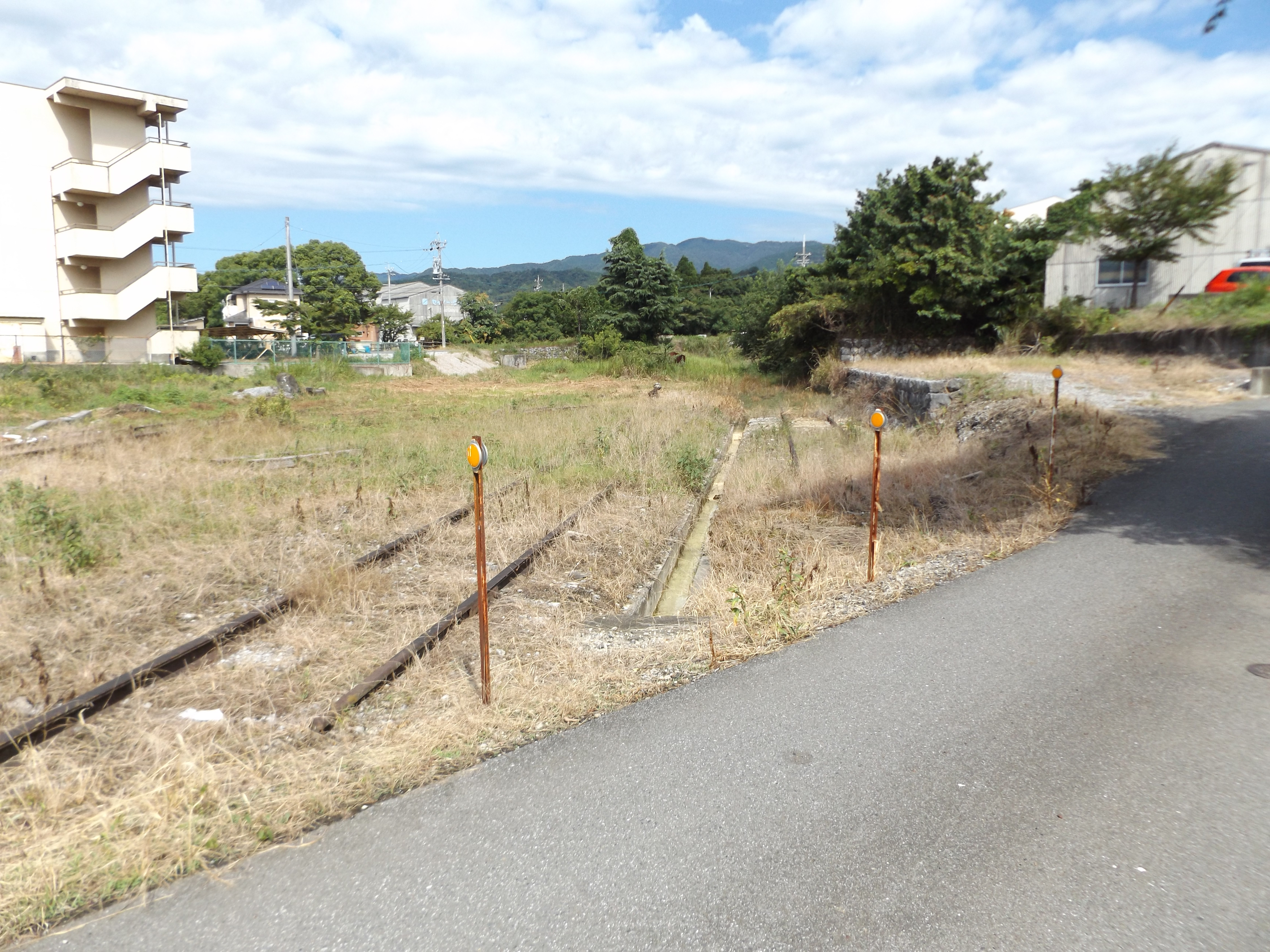 西濃鉄道昼飯線昼飯駅跡の構内。